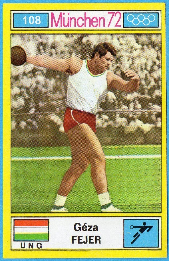 MUNCHEN/MONACO '72-PANINI-Figurina n.108- FEJER - UNGHERIA -ATLETICA LEGG.-Rec